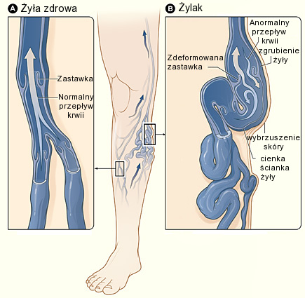 Obrazek przedstawia zmiany w kończynie dolnej spowodowane żylakami. Po lewej stronie jest pokazana noga zdrowa, po prawej z żylakami